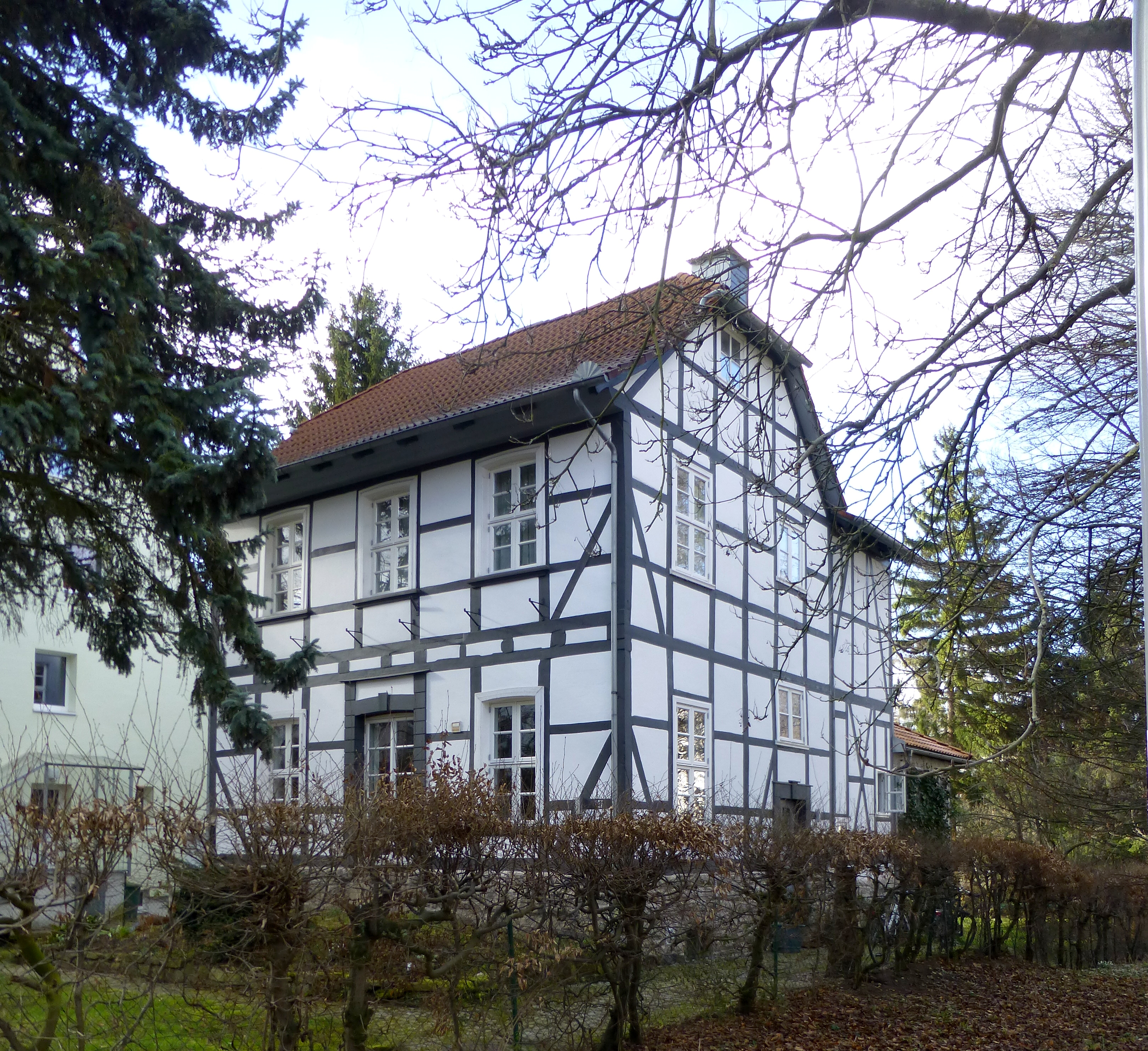 Ehemaliges Gartenhaus von Georg Christoph Lichtenberg in Göttingen, Südniedersachsen. Erbaut um 1775 an der Weender Landstraße 37, im Jahr 1908 in den Brauweg (Nr. 34) versetzt. Auf dieses Haus baute Lichtenberg 1780 den ersten Blitzableiter in Deutschland